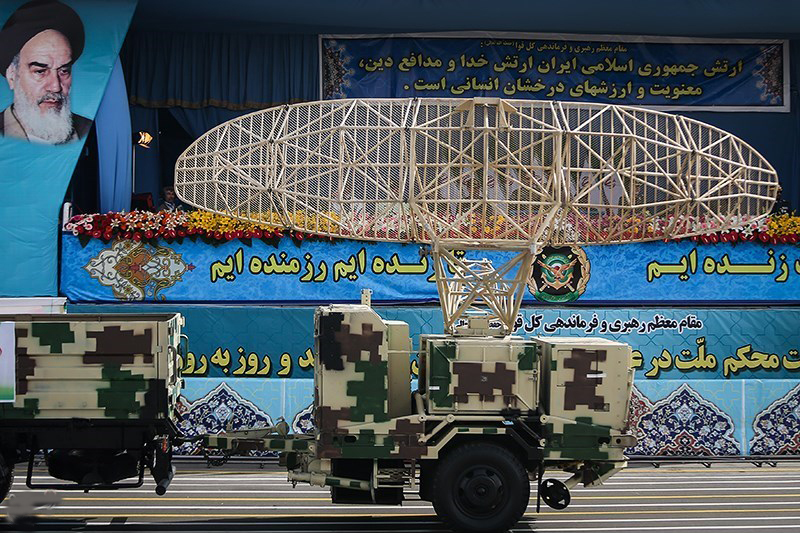 رادار سامانه موشکی مرصاد مرصاد یک سامانه پدافند هوایی میانبرد و ارتفاع متوسط است که سال ۹۰ به صورت عملیاتی در اختیار یگان‌های پدافندی مستقر در نقاط مختلف ایران است